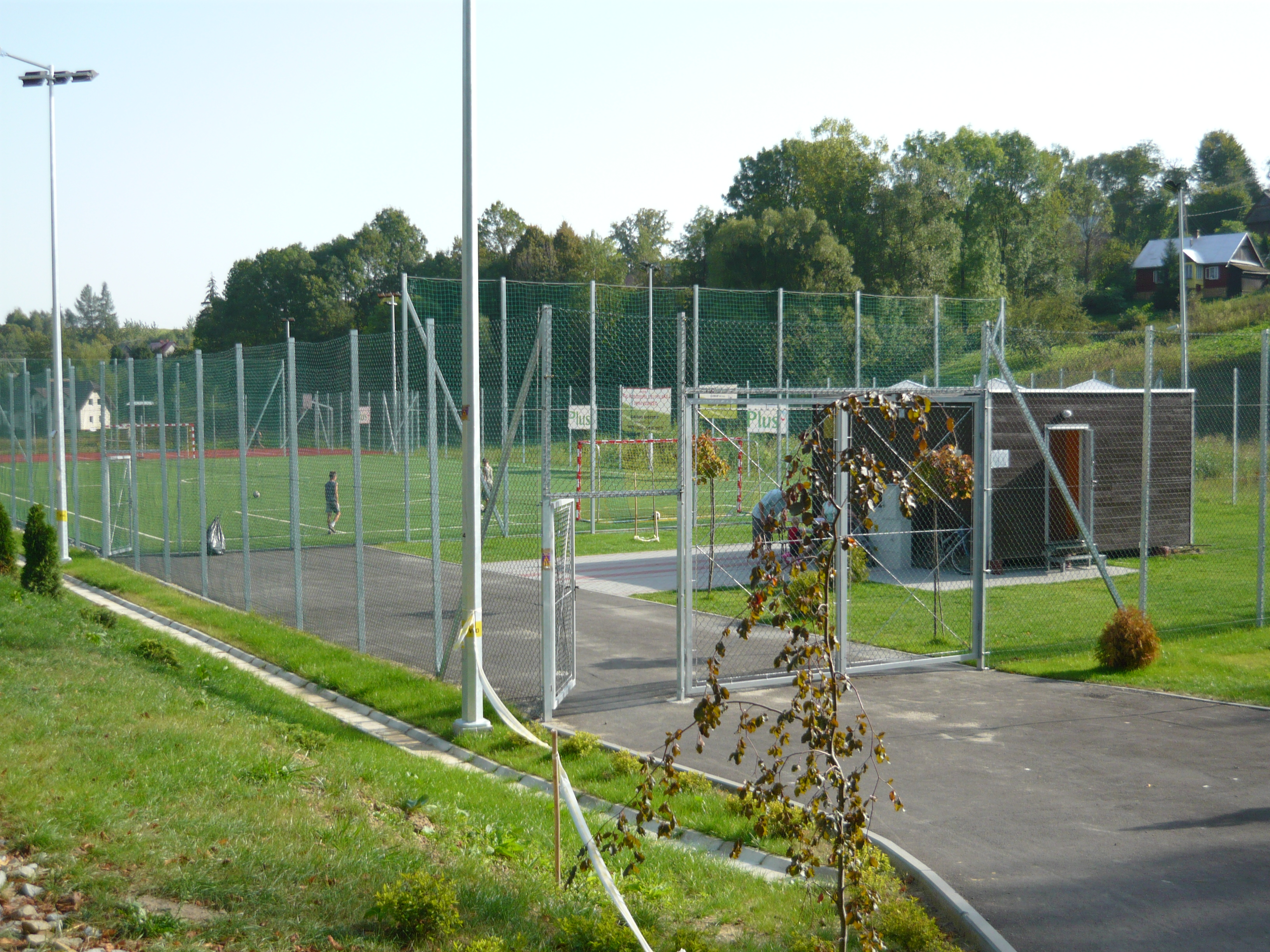 Stadion "Orlik" w Izdebkach